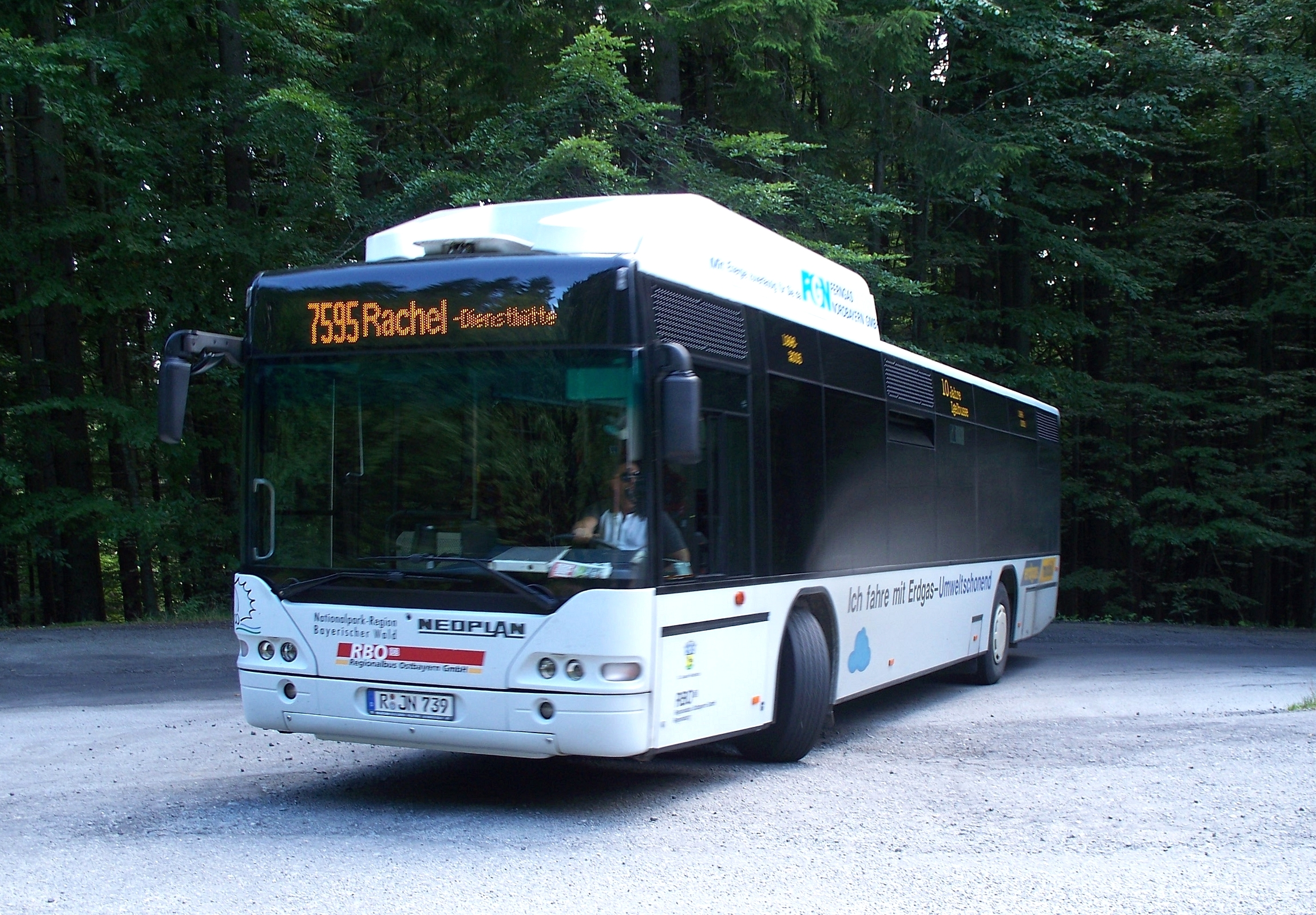 Der, von einem Erdgasmotor angetriebene, Igelbus „Rachel“ am Wendeplatz Gfäll im Nationalpark Bayerischer Wald.